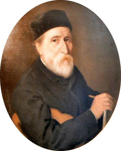 Huile sur toile de Charles Vernier.